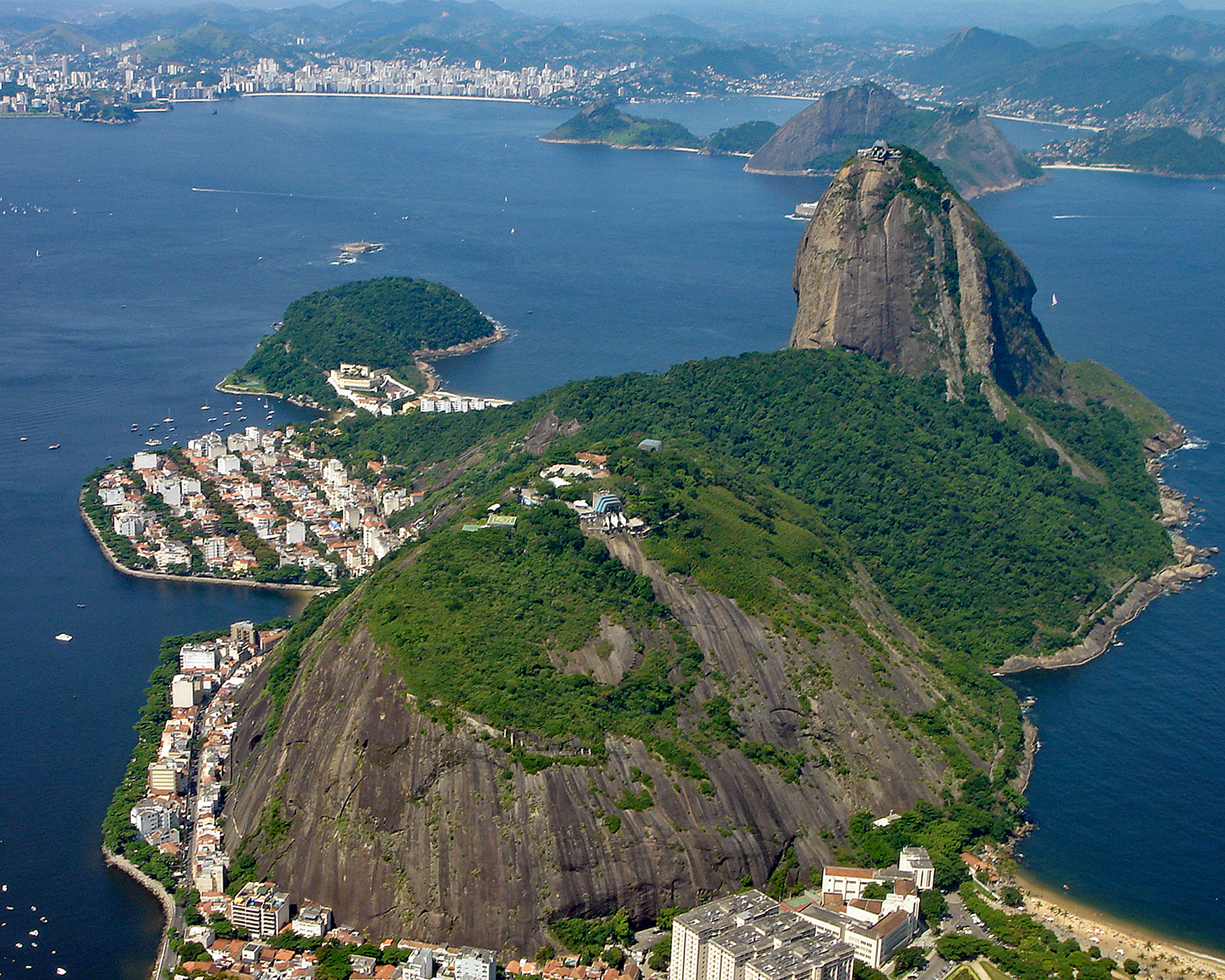 Pão de Açucar